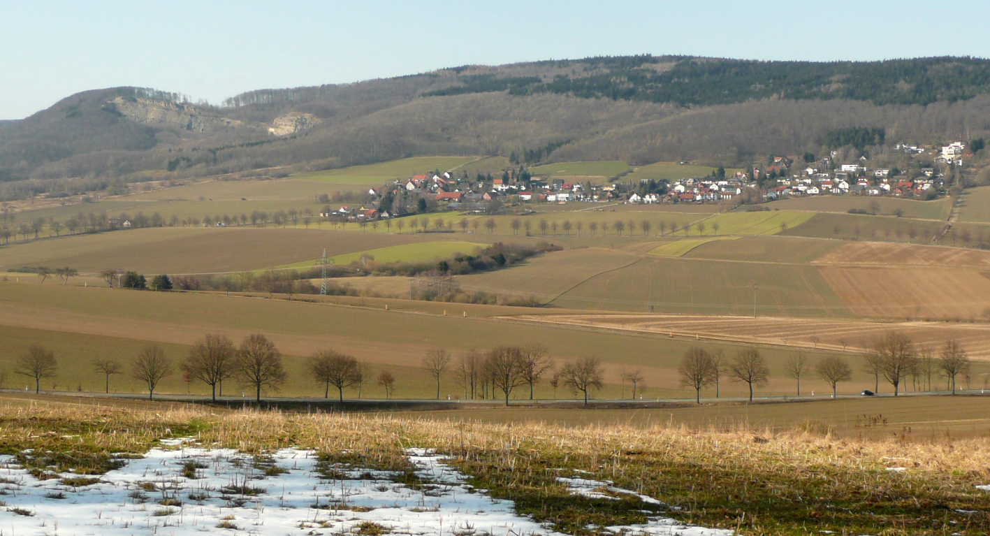 Blick vom Schweineberg bei Holtensen auf Welliehausen und dahinter der Süntel mit der Hohen Egge